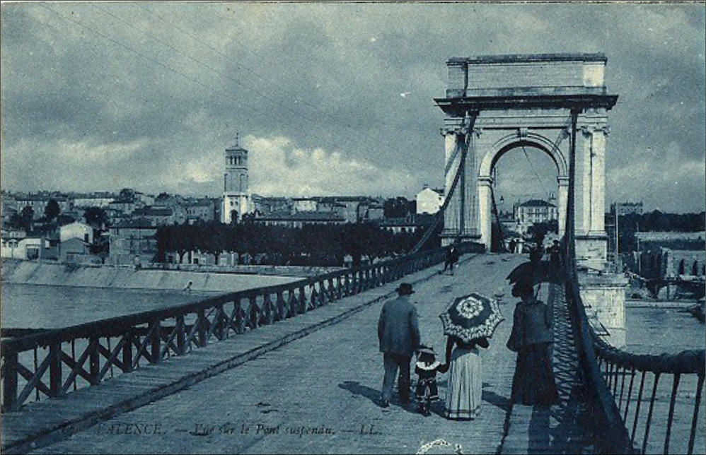 Pont suspendu de Valence du début du XXème siècle